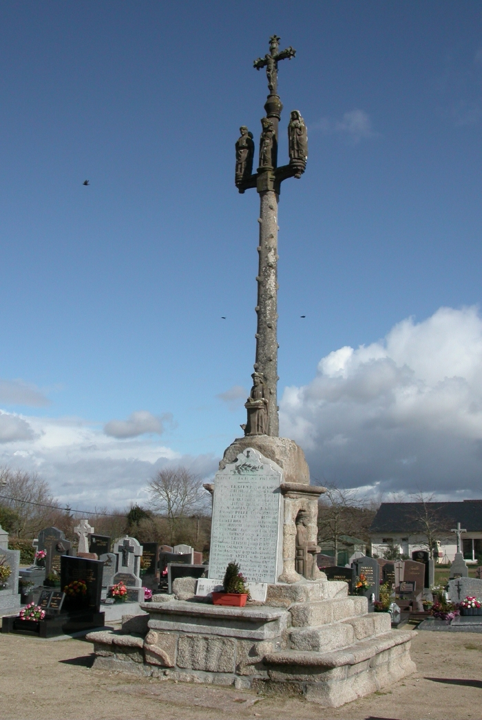 Monument aux morts - Guipronvel-29, calvaire du XVIe siècle, Histoire, patrimoine et noblesse de Bretagne